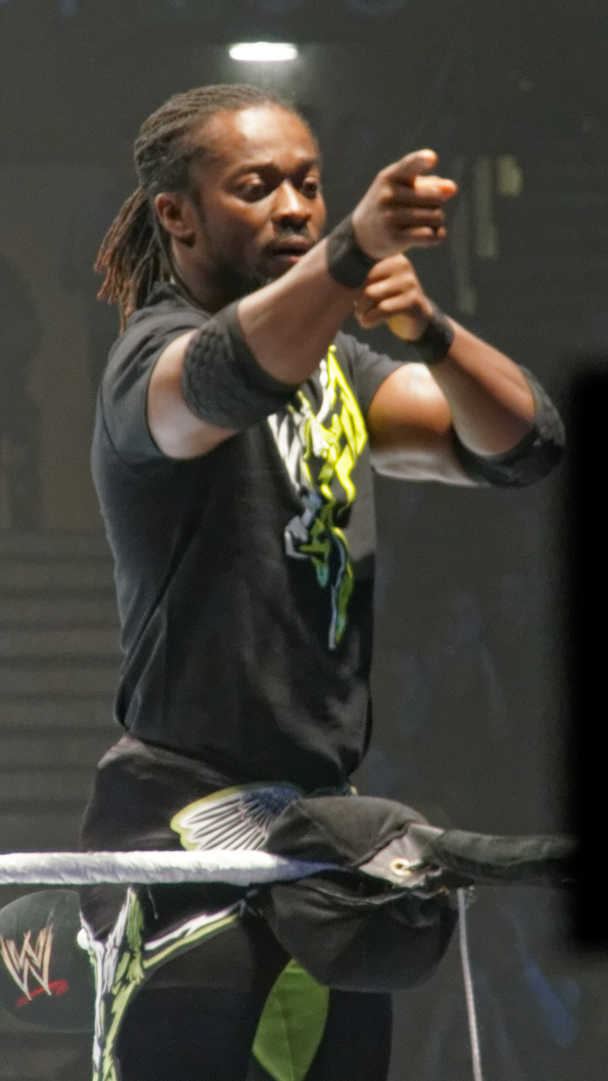 2013-11-08_20-39-21_NEX-6_7813_DxO